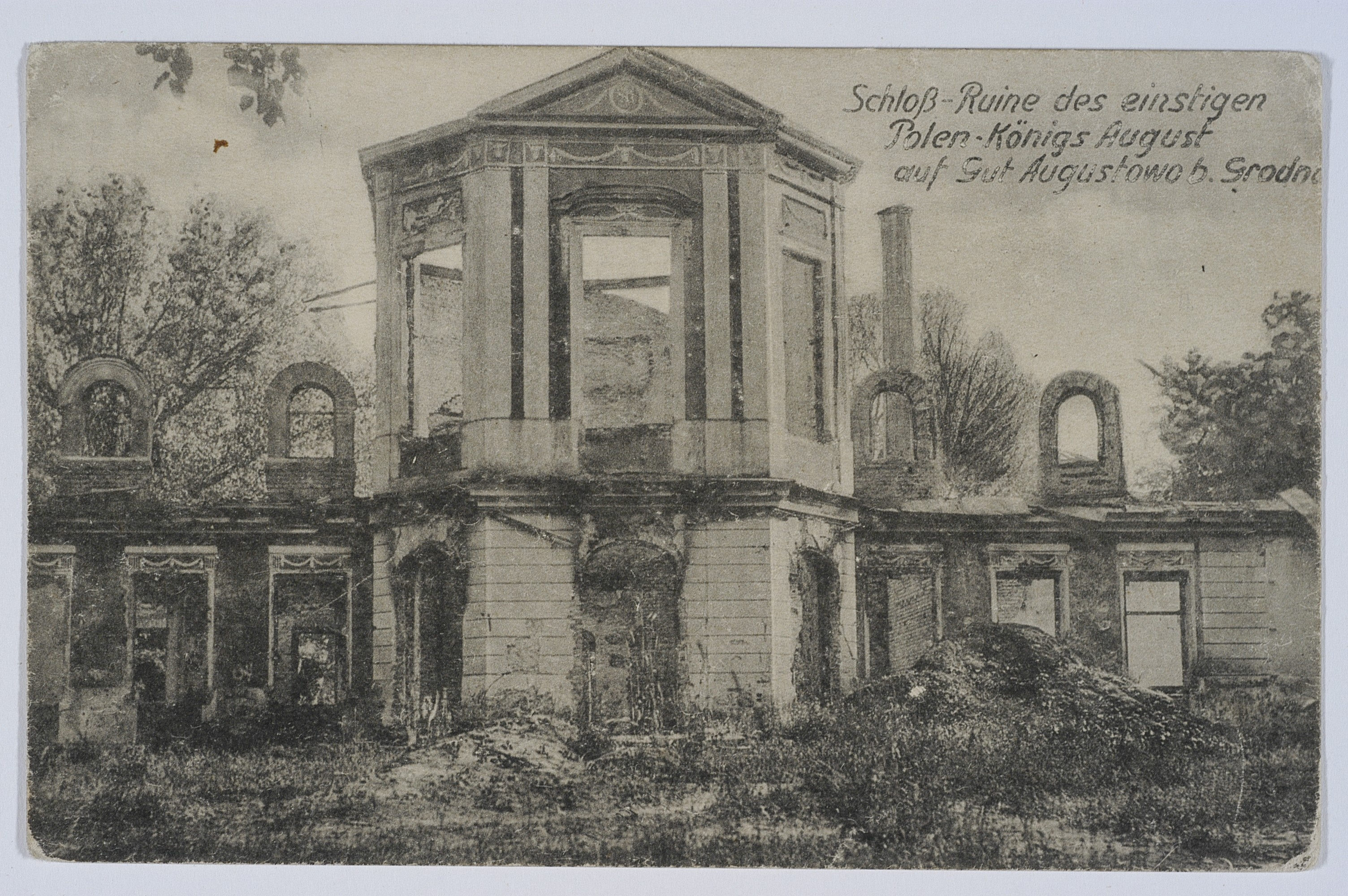 Беларуская (тарашкевіца): Горадня (Horadnia), Аўгустовак (Aŭgustovak). Сядзіба